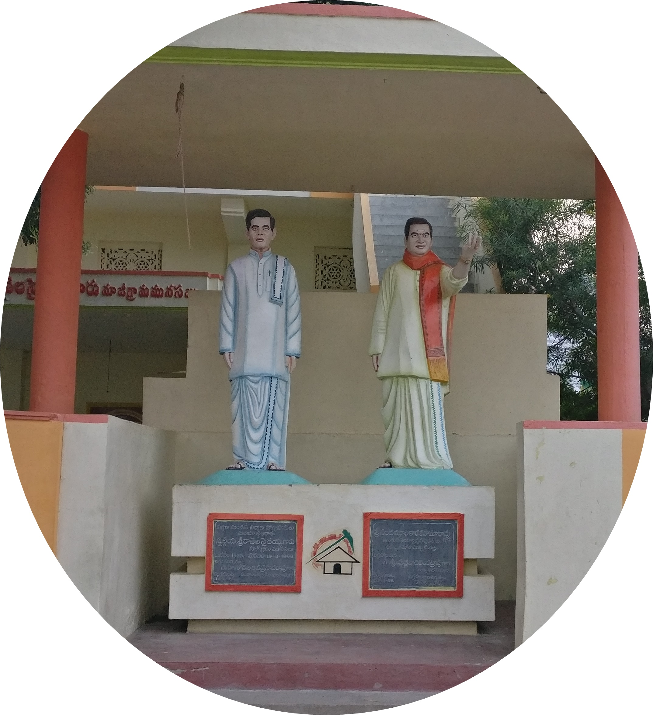 Village Statues